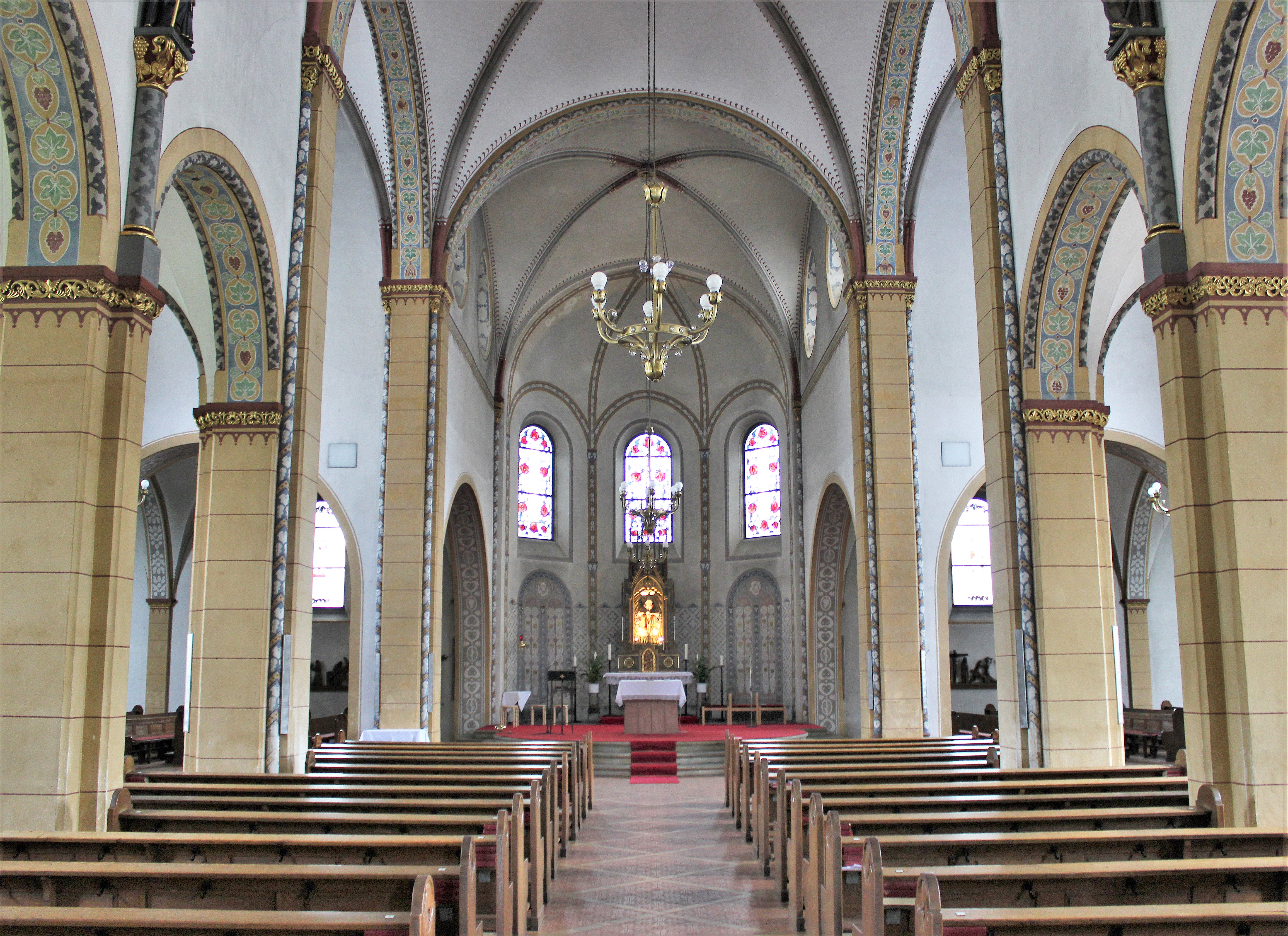 Blick ins Innere der katholischen Pfarrkirche St. Marien in Ensdorf, Landkreis Saarlouis, Saarland